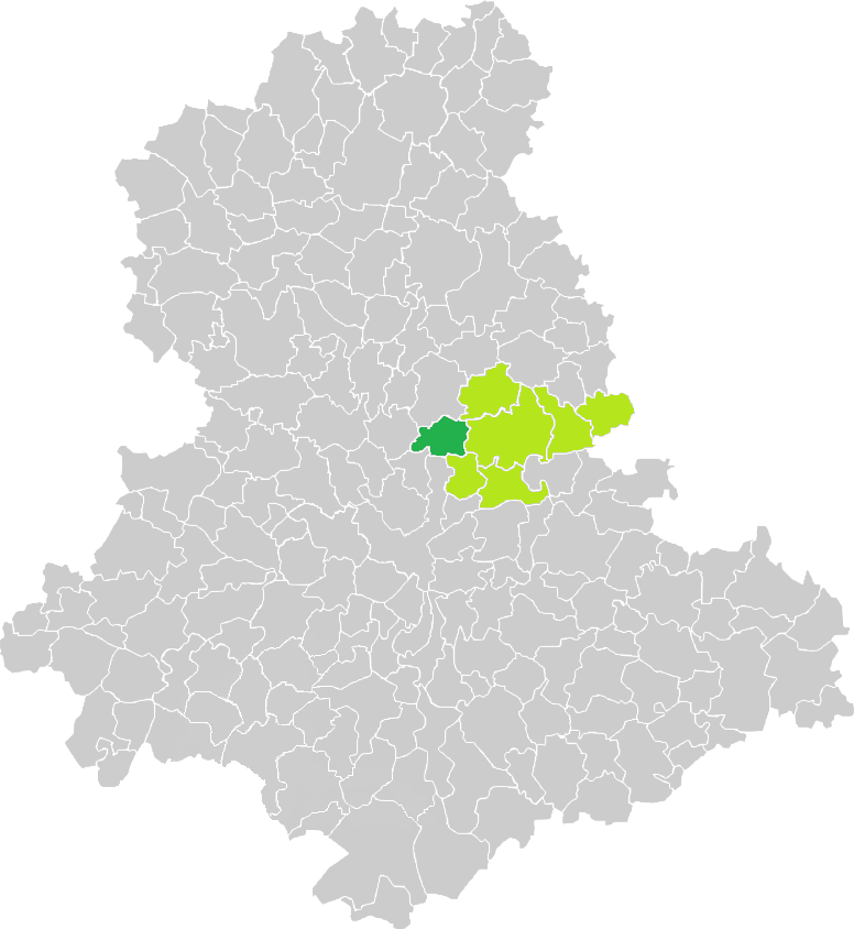 Carte de situation de la commune de Bonnac-la-Côte (en vert foncé) dans le votre Canton (en vert clair) sur une carte des communes de la Haute-Vienne